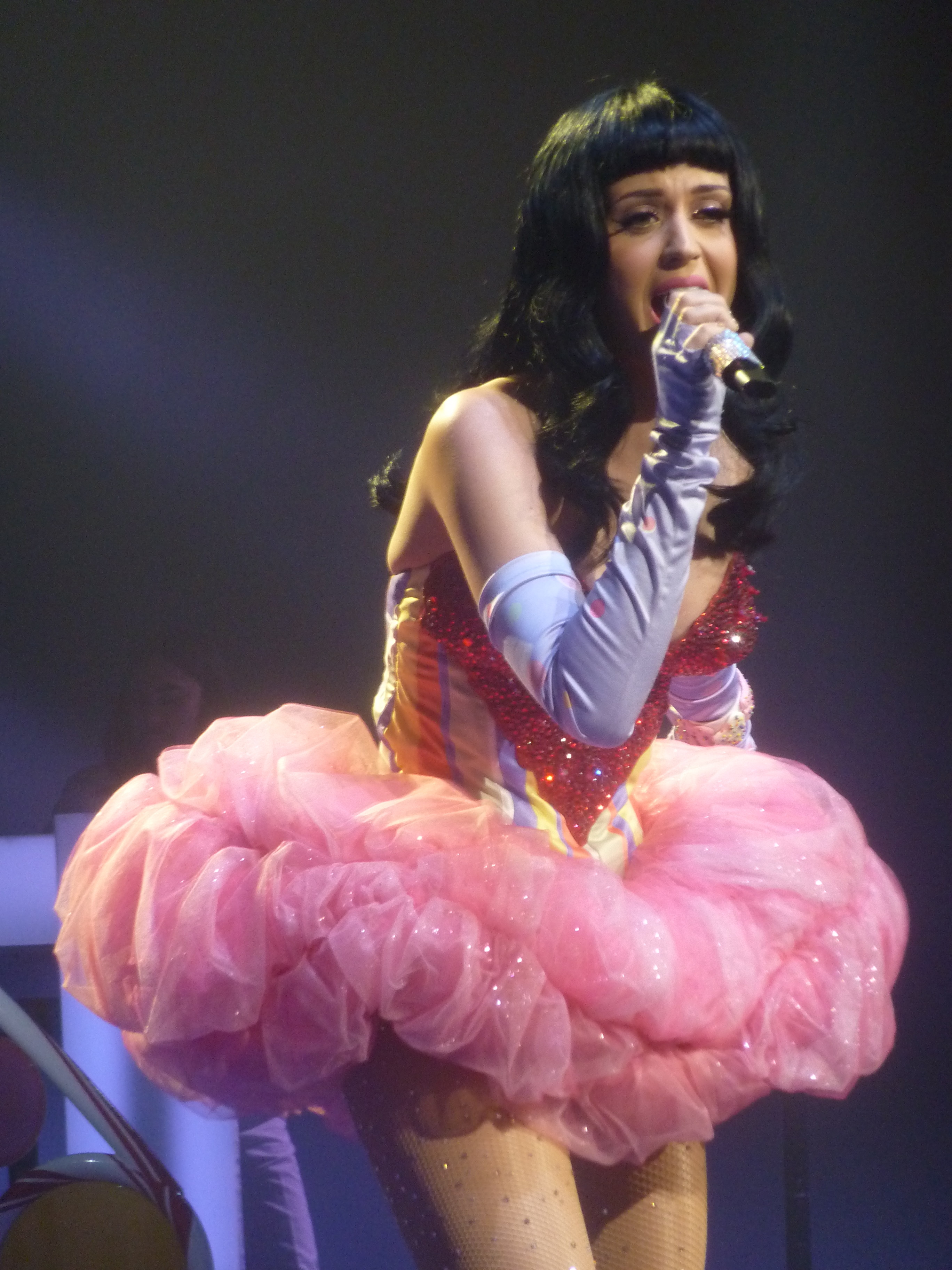 Photos de Katy Perry en concert au Zenith de Paris en mars 2011 dans le cadre de sa tournée " California Dreams Tour "